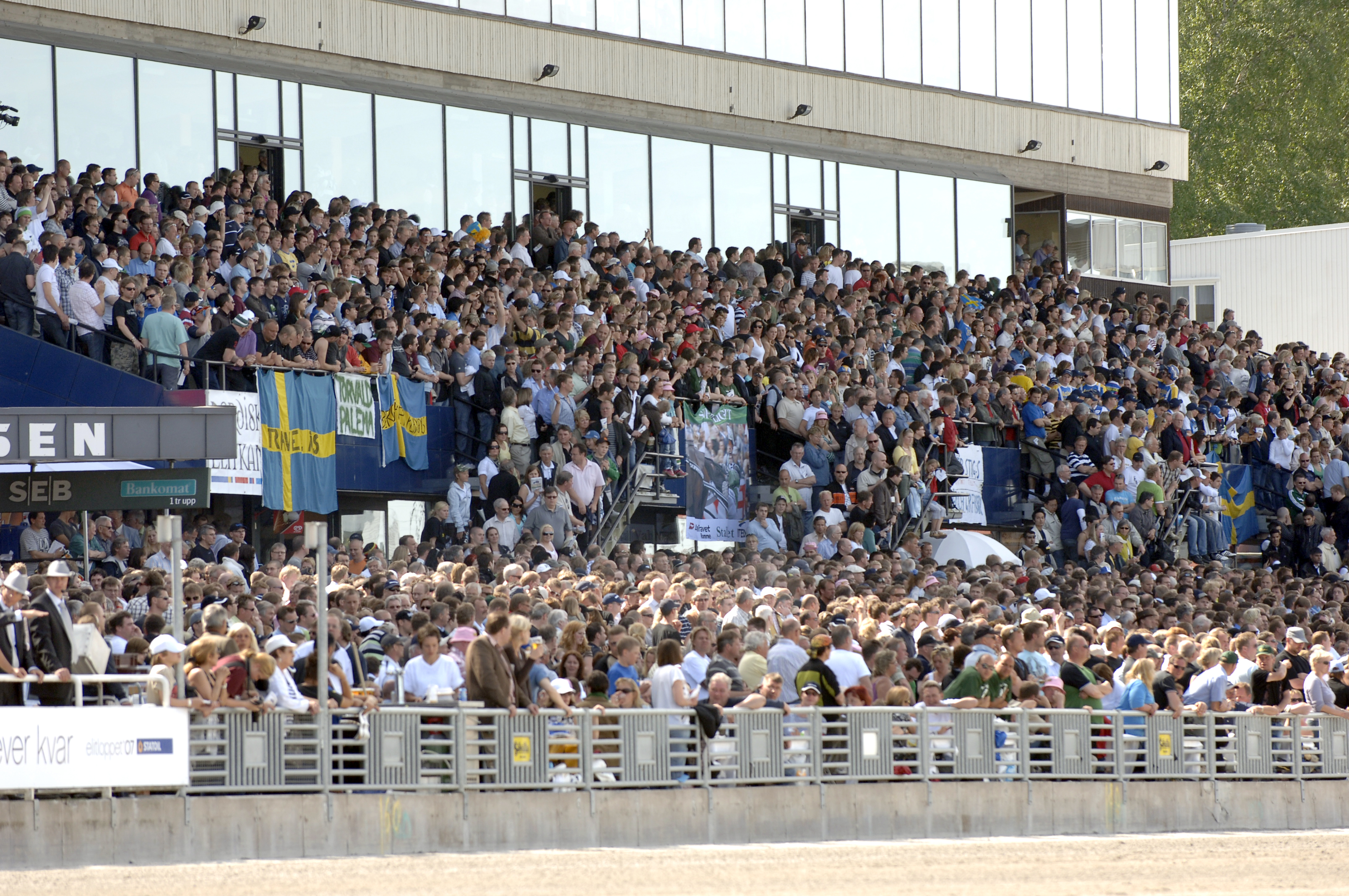 Publikläktaren på Solvalla under Elitloppet 2007.